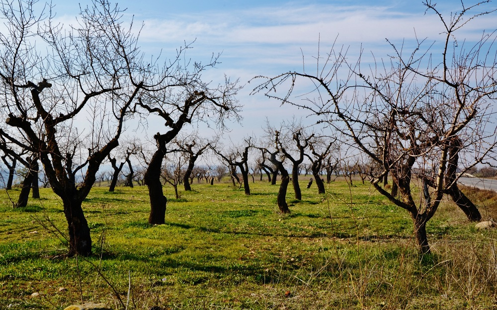 Les Borges Blanques, Garrigues